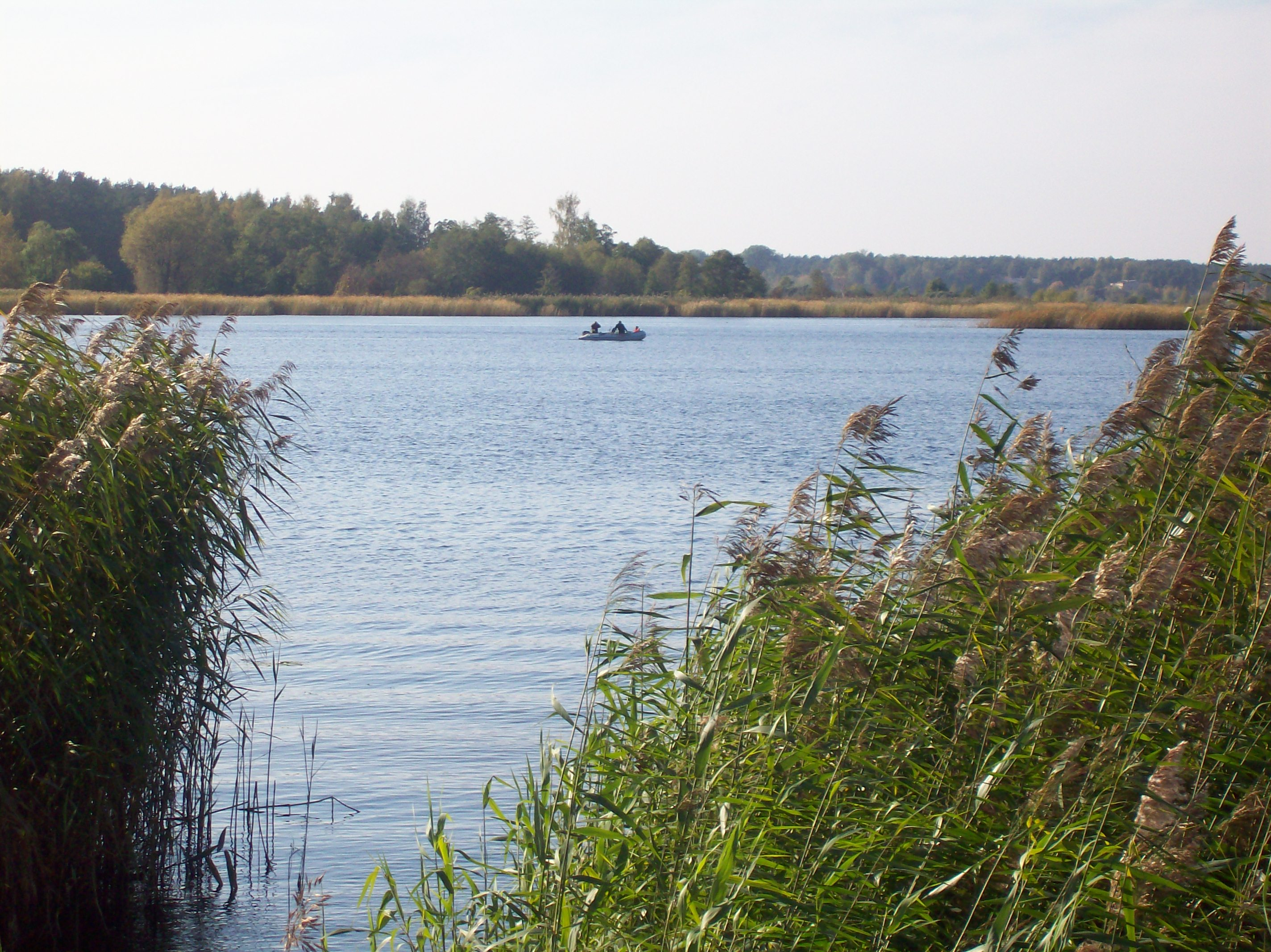 Lielupe river